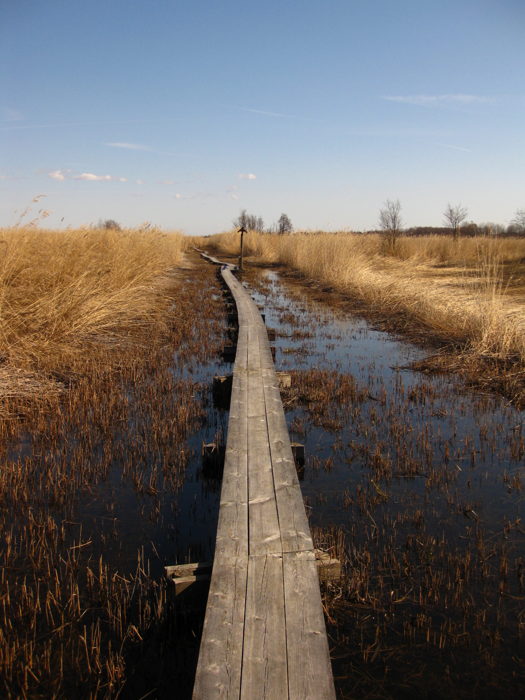 Saare matkarada, Sutlepa meri, Silma LKA